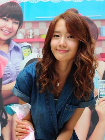 '소녀시대와 함께하는 쿠키 데이트’ Lg전자가 26일 저녁 ‘소녀시대의 쿠키(이하,‘소시의 쿠키’, 모델명: Lg-su920/Lg-ku9200)’의 구매 고객 100명을 초청, 삼성동의 한 갤러리 카페에서 ‘소녀시대와 함께하는 쿠키 데이트’ 행사를 열었다. 소녀시대 멤버들이 자신만의 쿠키를 만든 후 소개하고 있다.